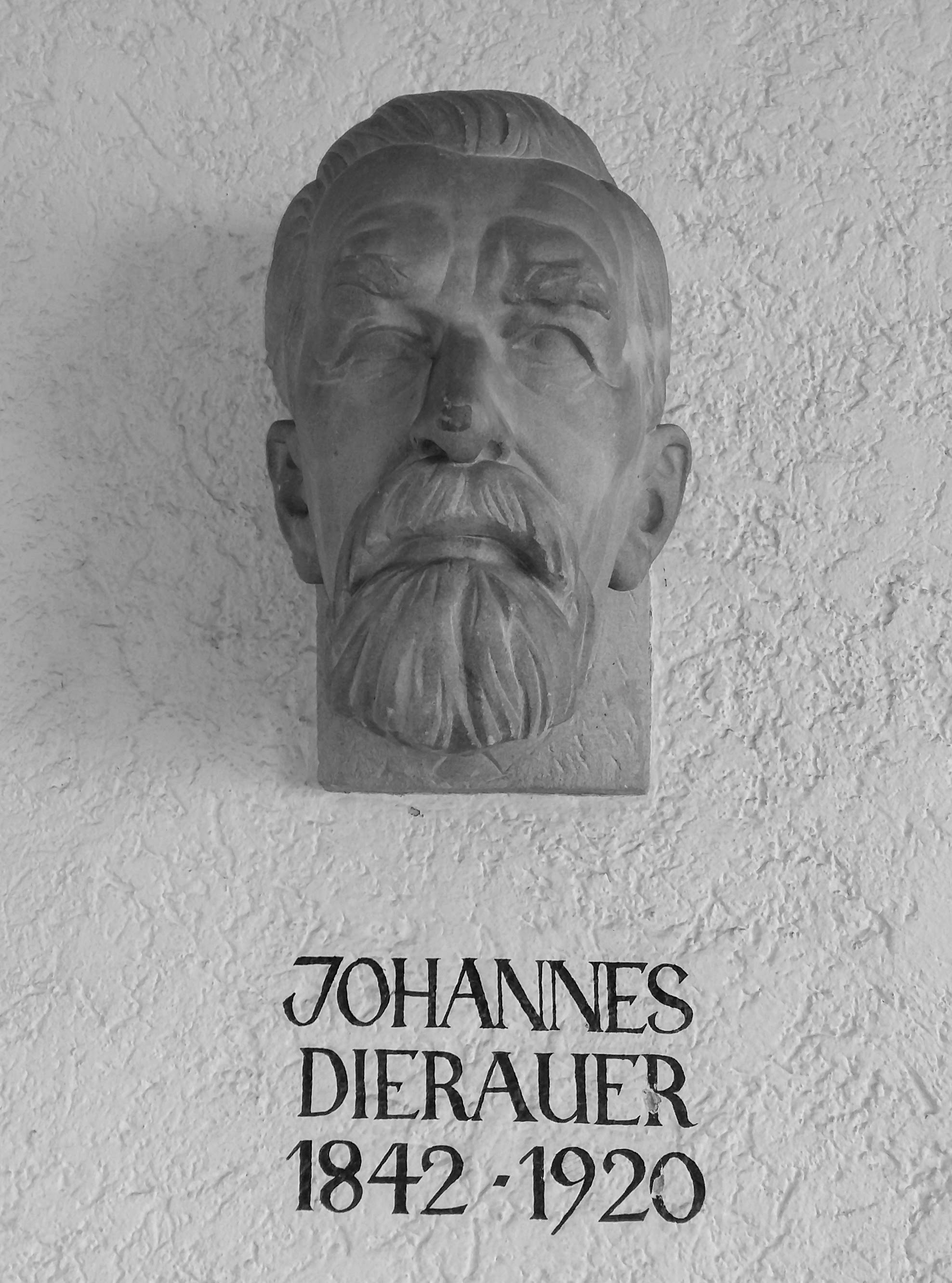 Inschrift mit Bildnis in der Marktlaube des Rathaus Berneck SG zum Gedenken an Johannes Dierauer (1842-1920).